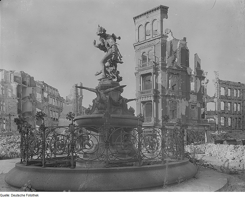 Original image description from the Deutsche Fotothek Gänsediebbrunnen gegen Ruinen